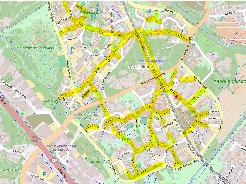 Malminkartanon kävelykatujen ja aukioden verkosto.